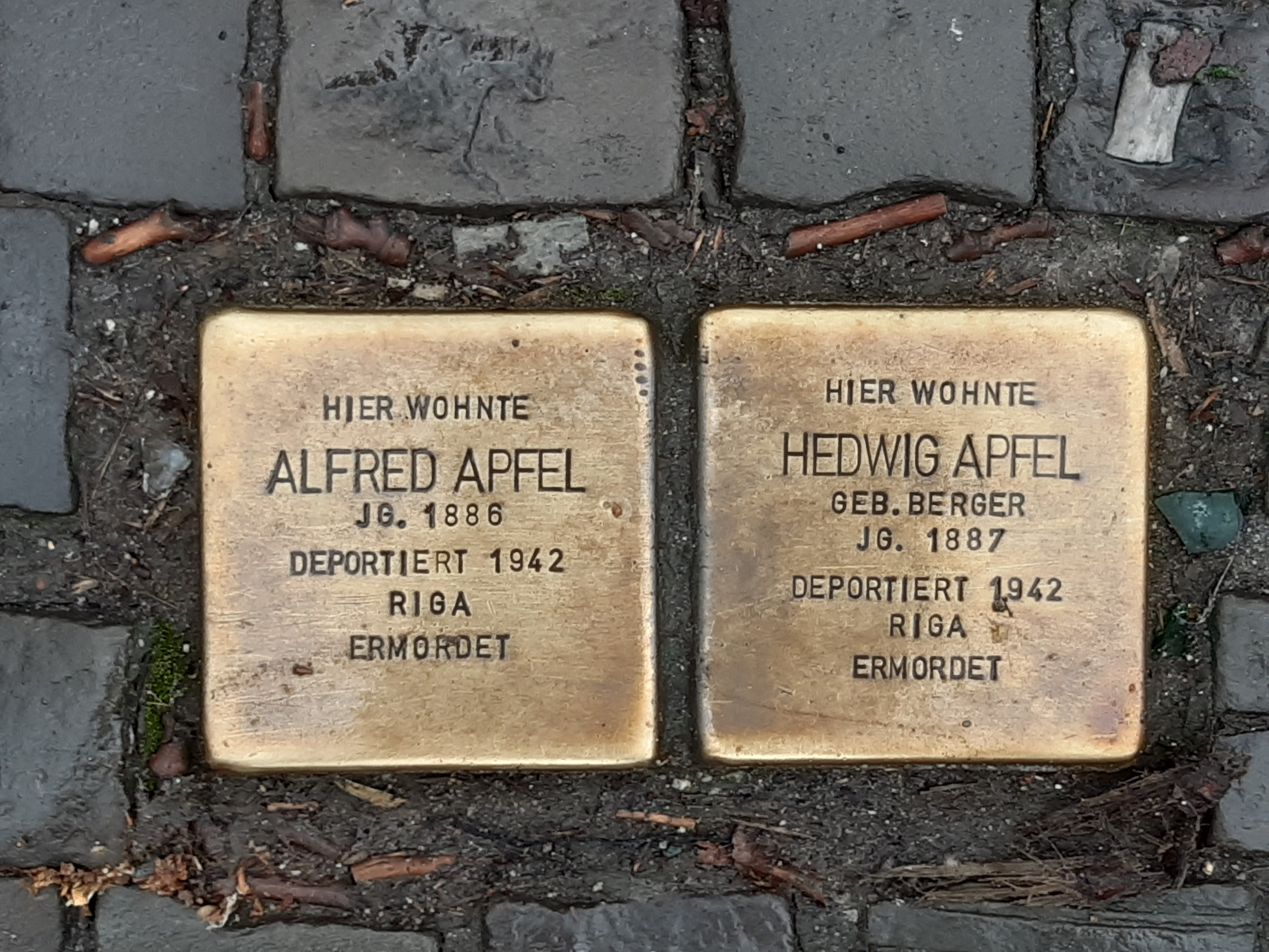 Stolpersteine für Alfred und Hedwig Apfel in Dortmund, Mallinckrodtstraße